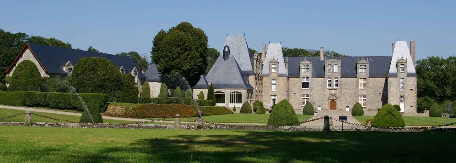 Château de la Roche Pichemer 2